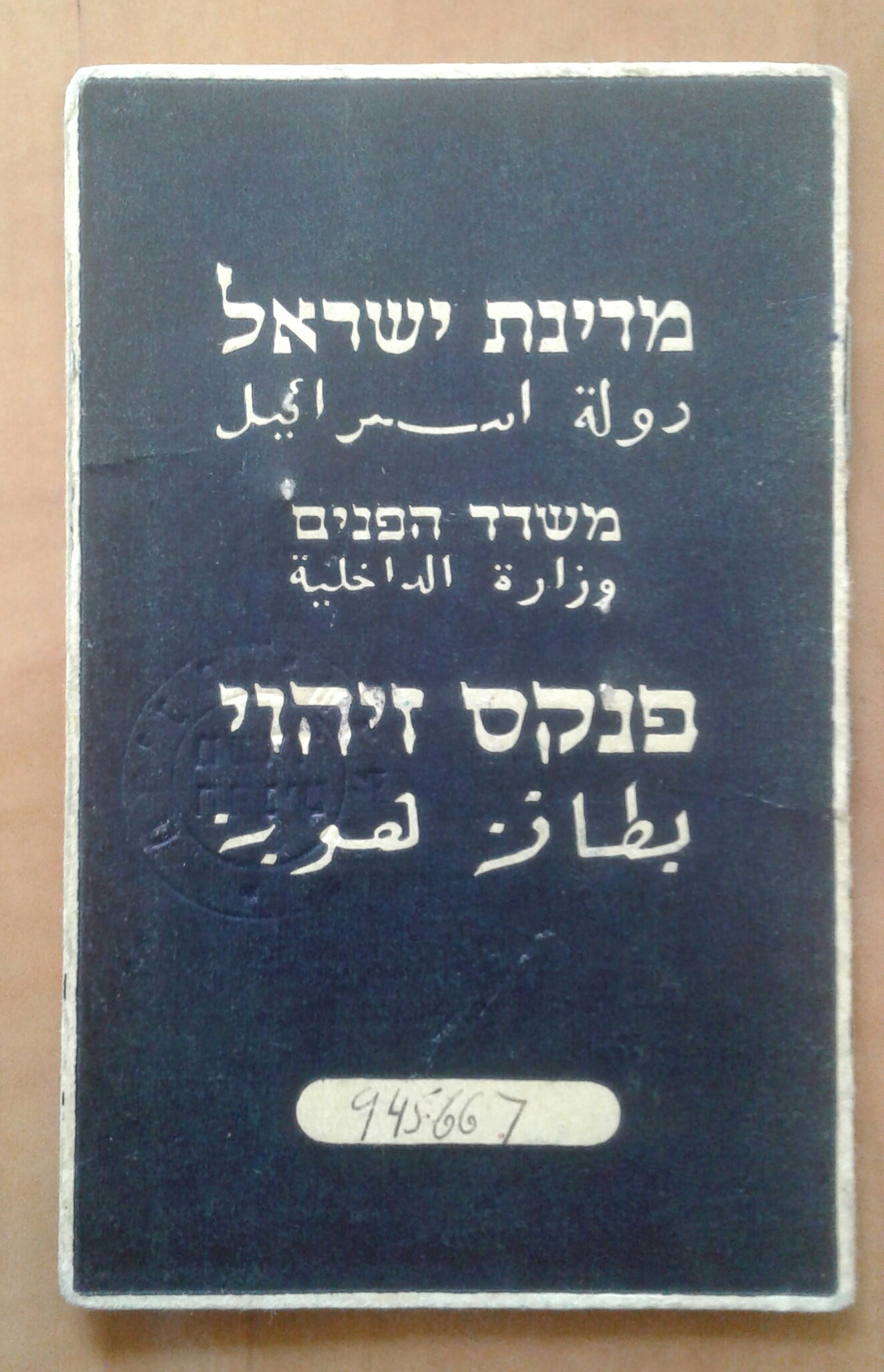 תעודת זהות שהונפקה בישראל בינואר 1949